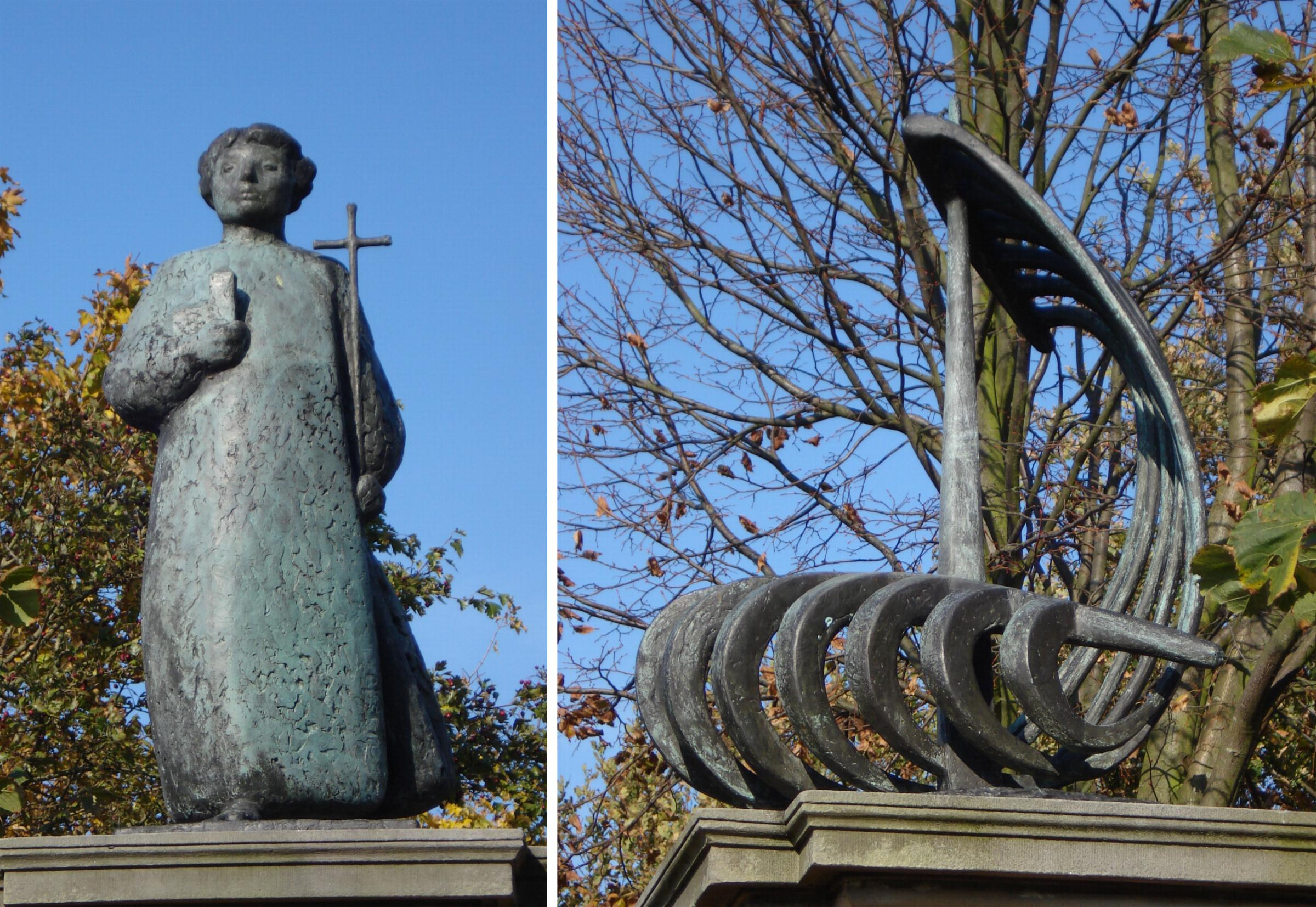 Oegstgeest, Haarlemmerstraatweg / groene kerkje. Kunstwerk "Willibrord en schip" van Monica Elias-Van Panthaleon Van Eck. Oegstgeest/The Netherlands. FOP.